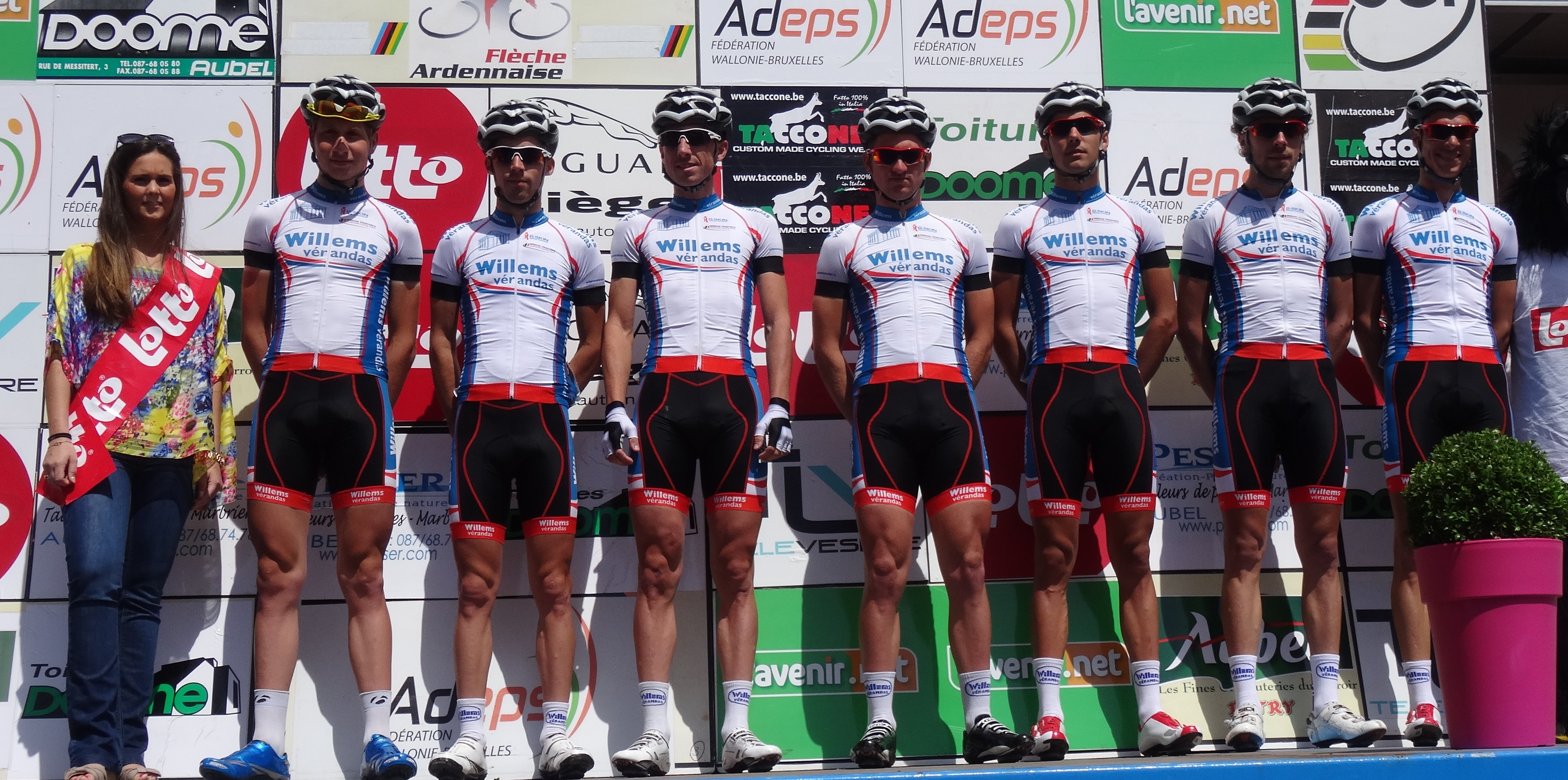 Reportage photographique réalisé le dimanche 22 juin à l'occasion du départ et de l'arrivée de la Flèche ardennaise 2014 à Herve, Belgique.